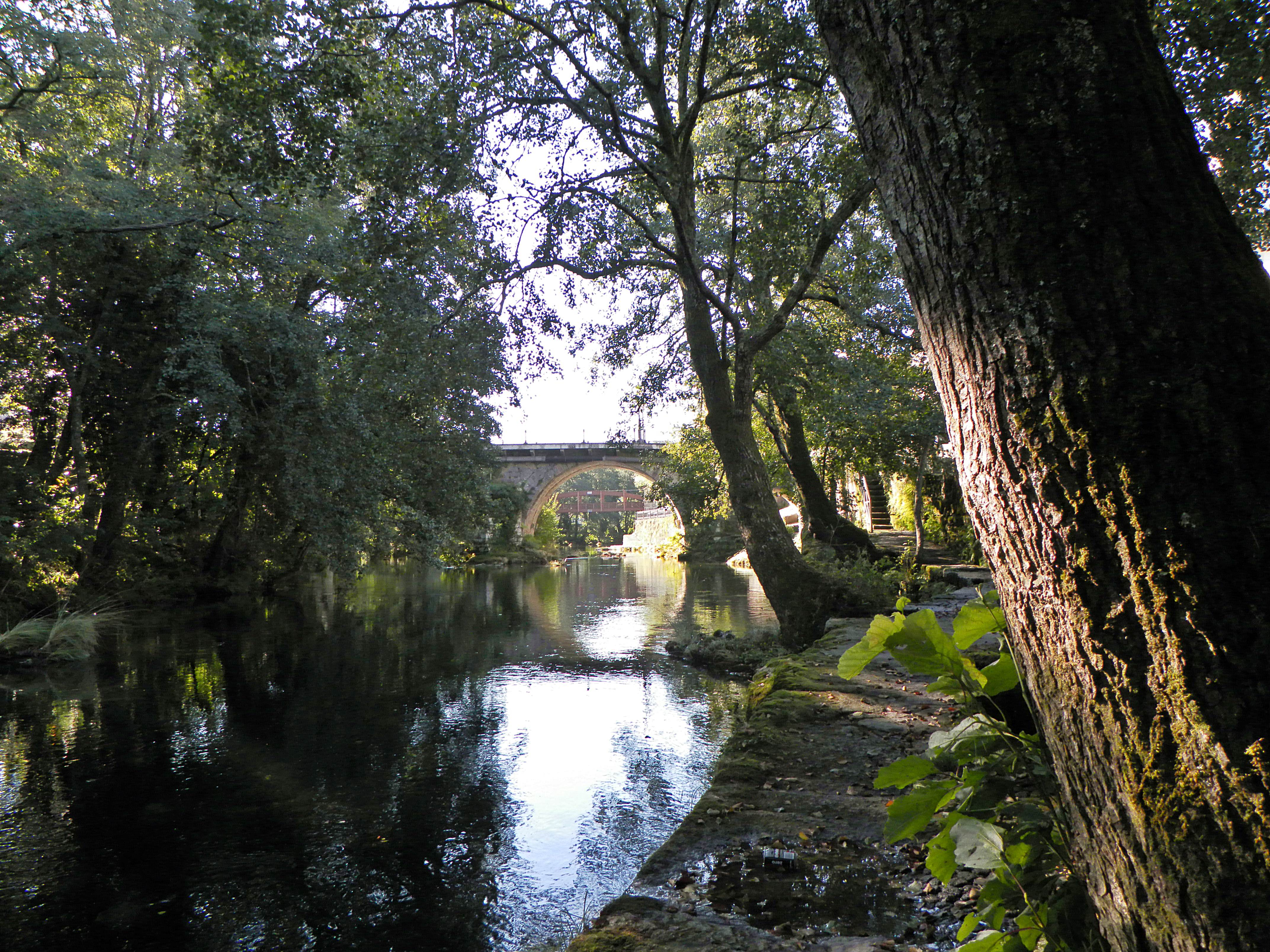 Río Verdugo a su paso por Pontecaldelas.